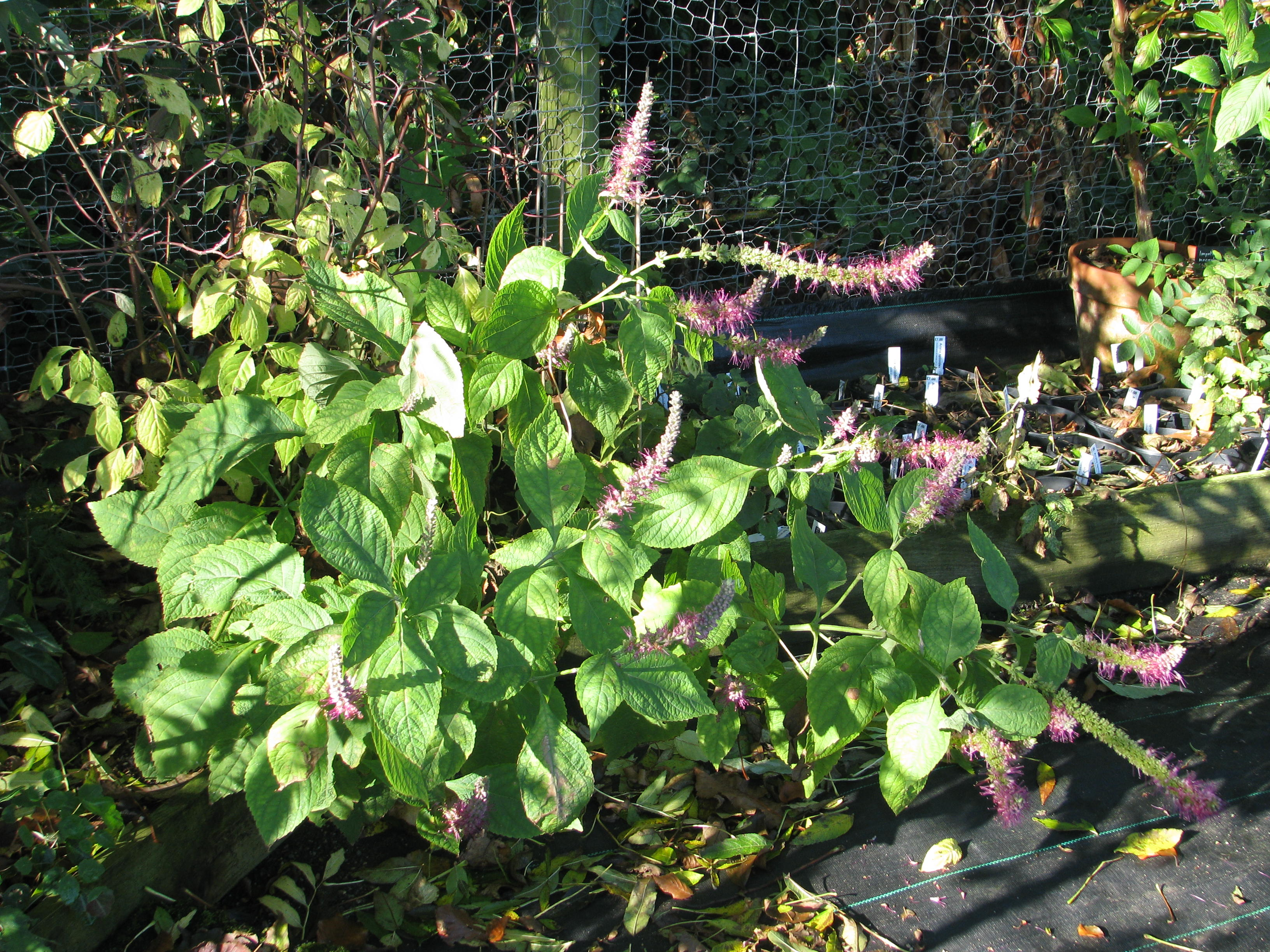 Leucosceptrum stellipilum formosanum